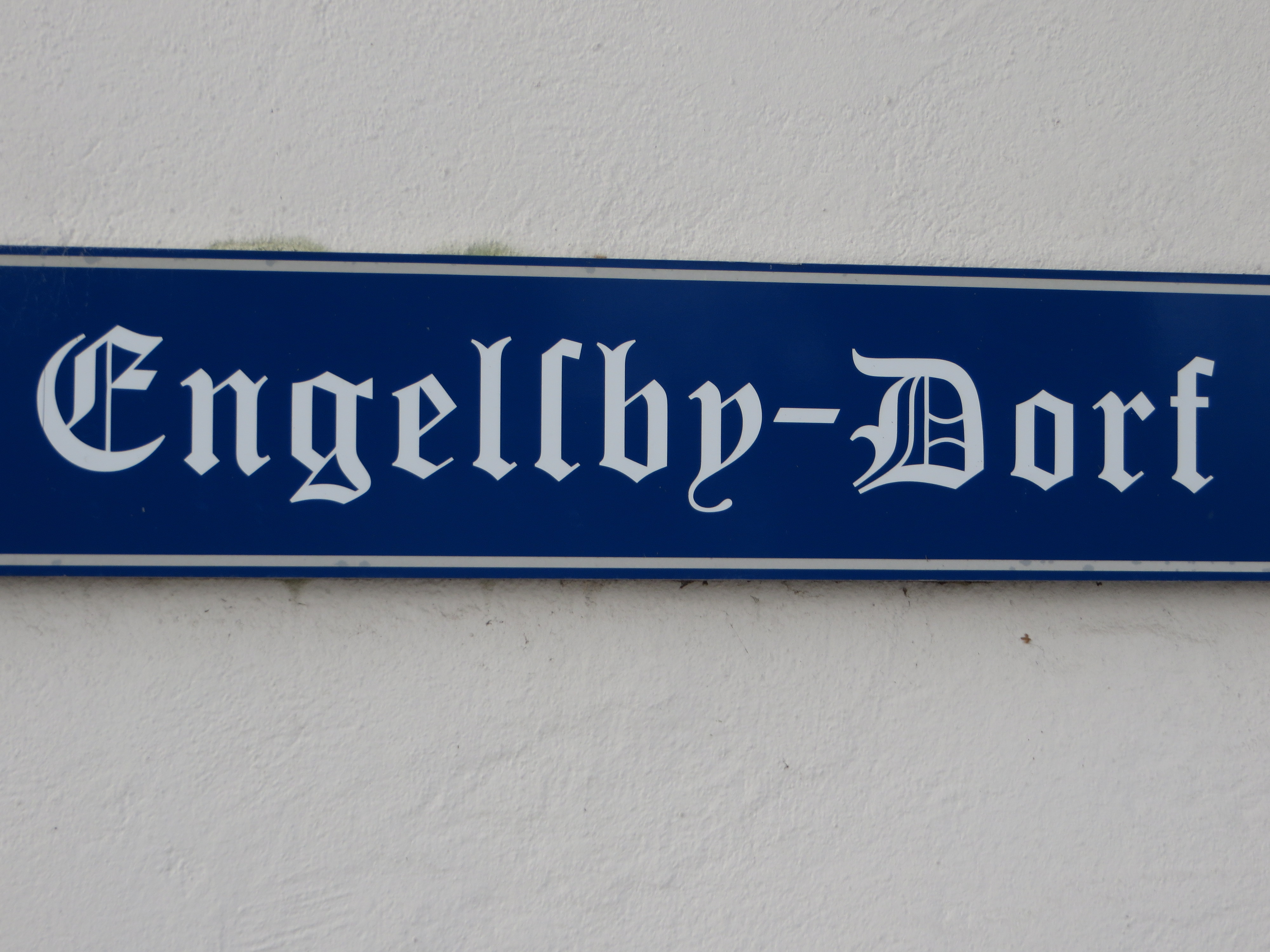 Straßenschild Engelsby-Dorf (Flensburg-Mürwik 2015); Teil des Schildes Engelsby-Dorf 1